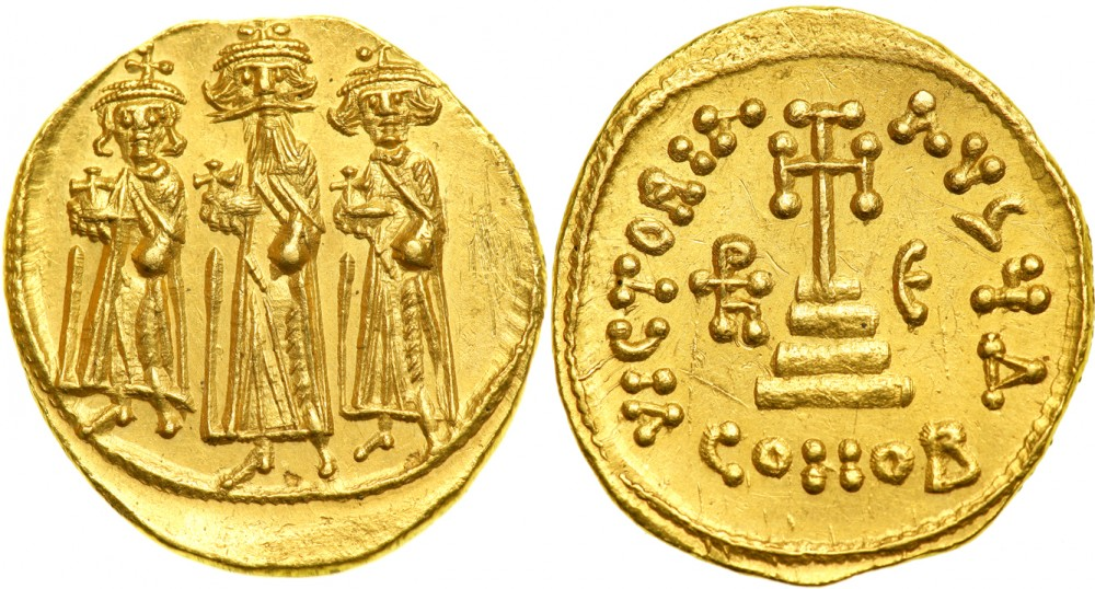 Solidus des Kaisers Heraklios (610 - 641), Konstantinopel, 639-641. Der Kaiser mit seinen bei­den Söhnen im vollen Ornat stehend en face: Heraklios in der Mitte, rechts Konstantin III., links Heraklonas, alle je­weils einen Kreuzglobus haltend. Perlkreis; Rs: VICTORIA AVGЧ. Crux potens auf dreistufiger Basis. Links im Feld Heraklios-Monogramm